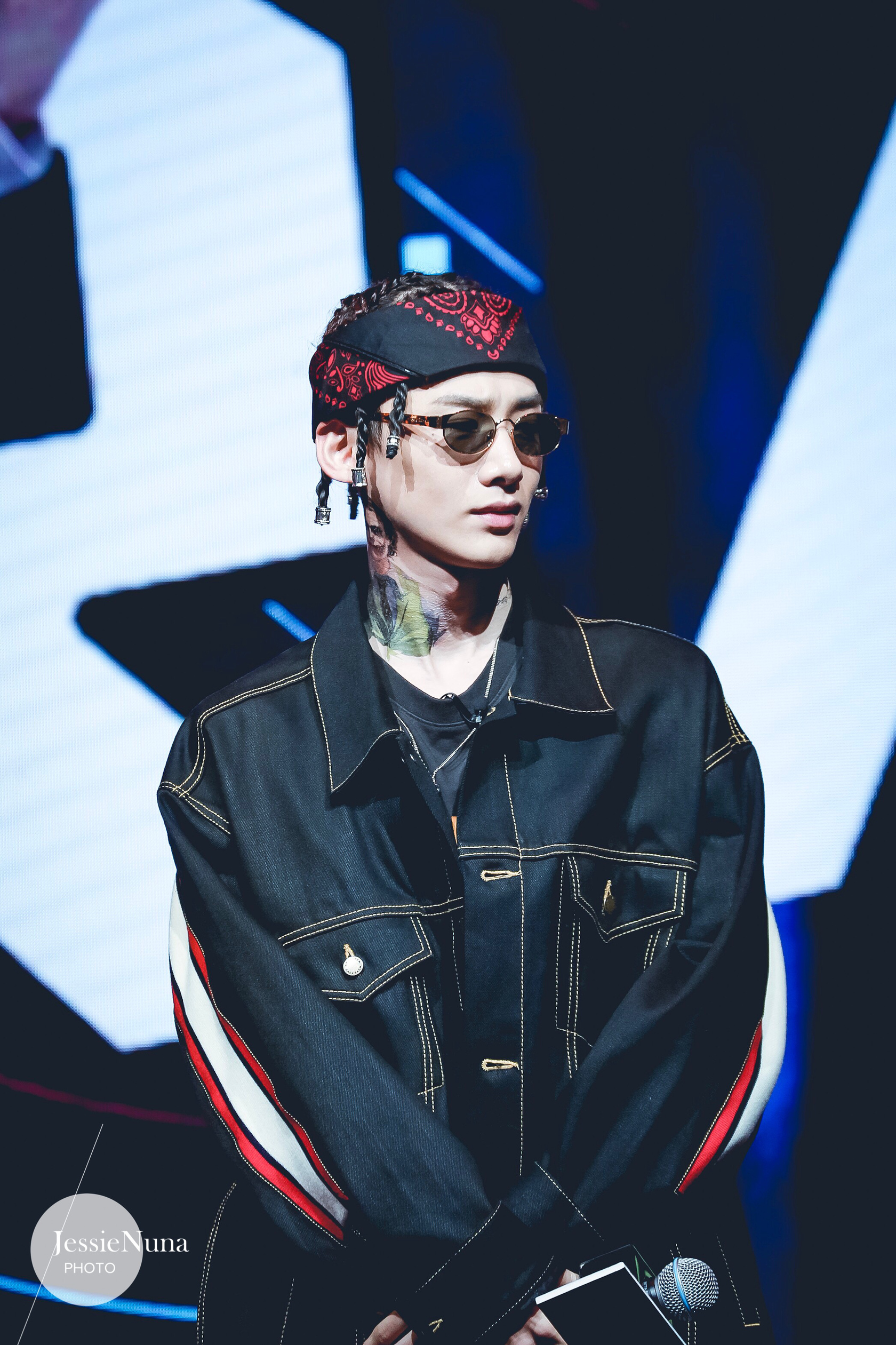 明星大侦探第三季发布会 白敬亭高清1P